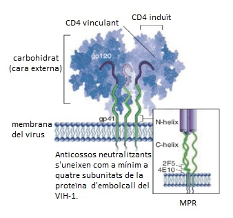 Descripció de les dues proteïnes del VIH que tenen relació amb la Cardiolipina